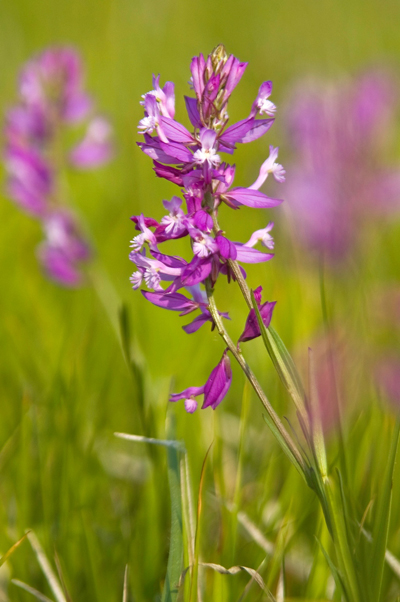 Nagy pacsirtafű a dunapataji Nagyszéken